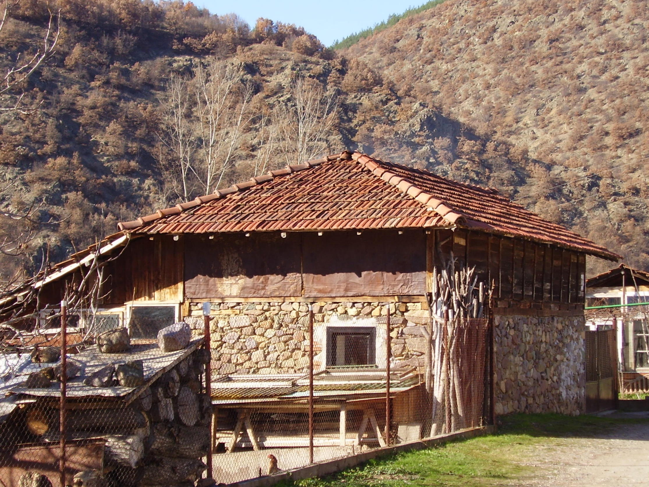 с.Пастух